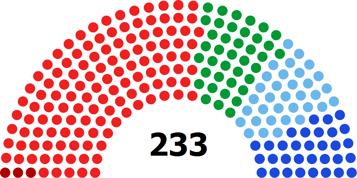 Sveriges riksdags andra kammare efter andrakammarvalet 1968.